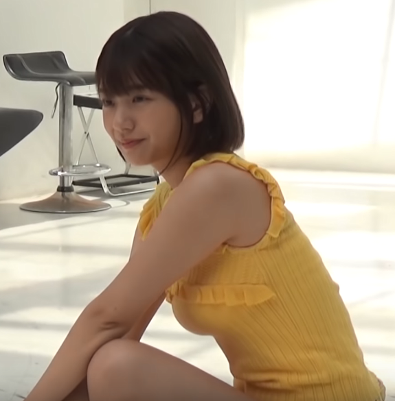 長月翠です。